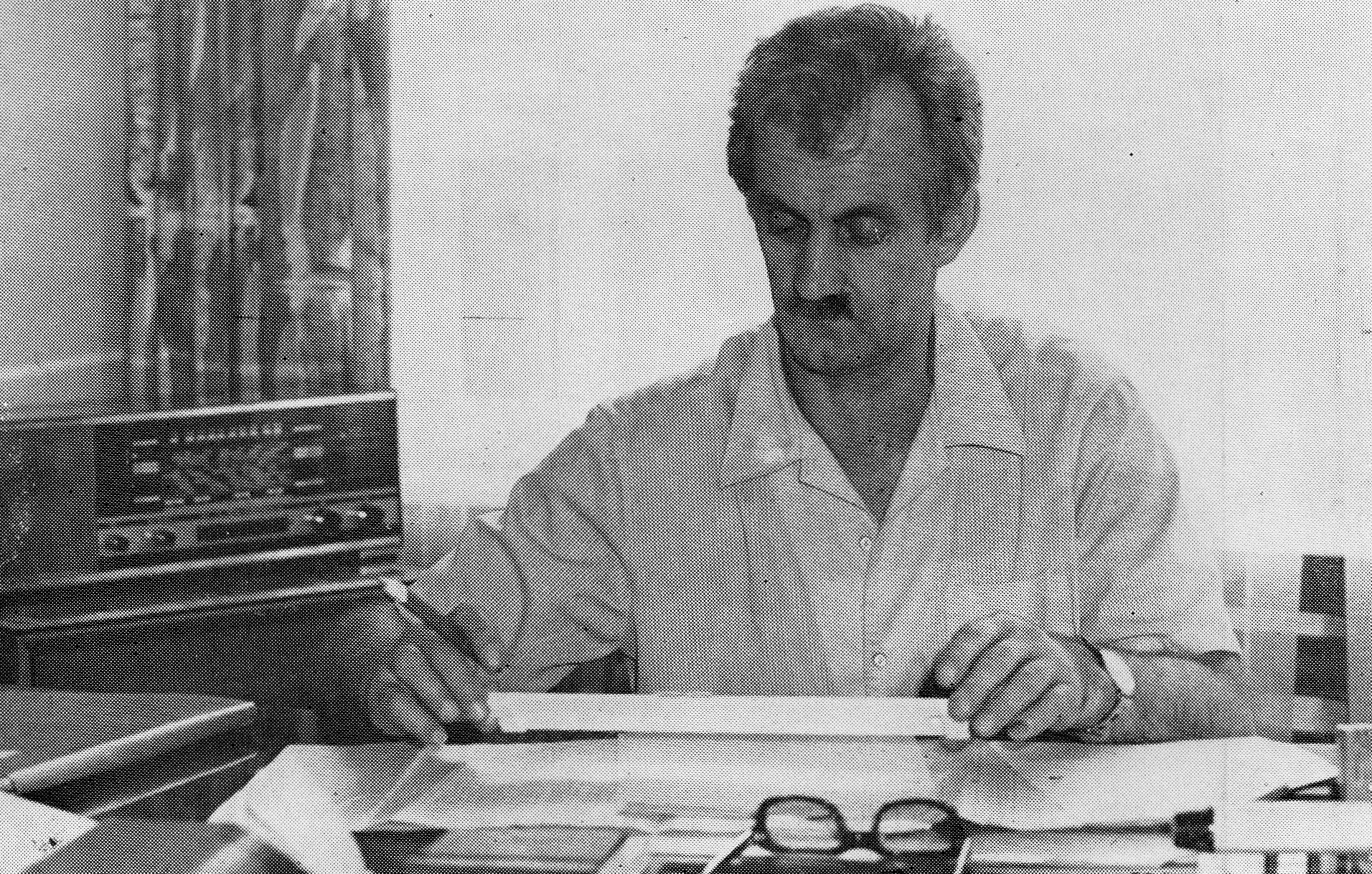 Edward Pindur - dyrektor Energopolu 7 w Poznaniu, około 1973.